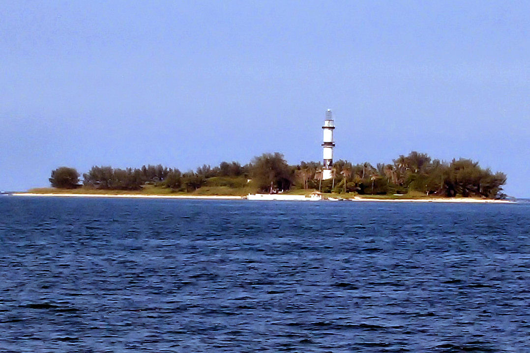 Isla Sacricios